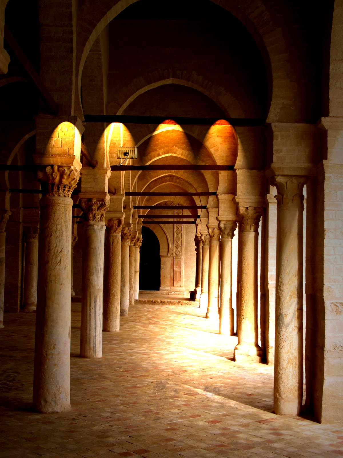 Kairouan